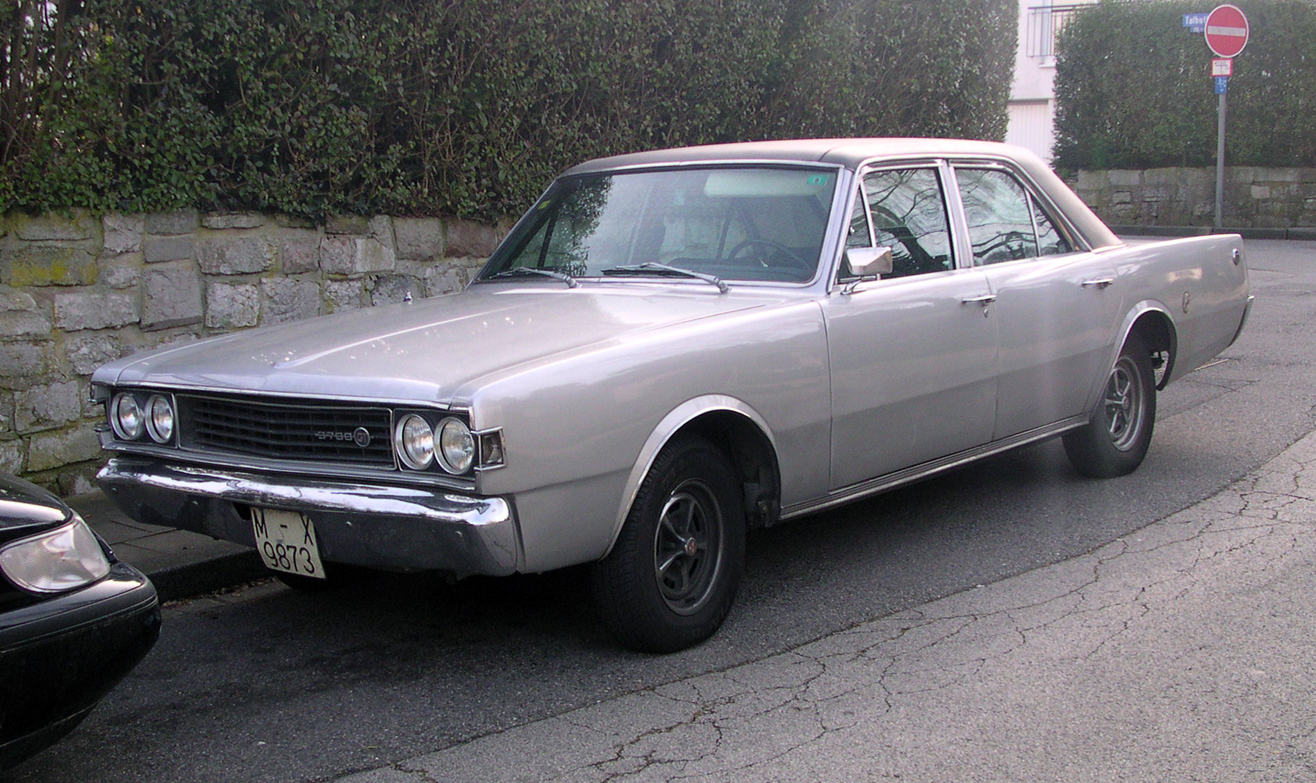 Dodge, dürfte wohl ein 3700 GT sein, das spanische Schwestermodell vom Dart.